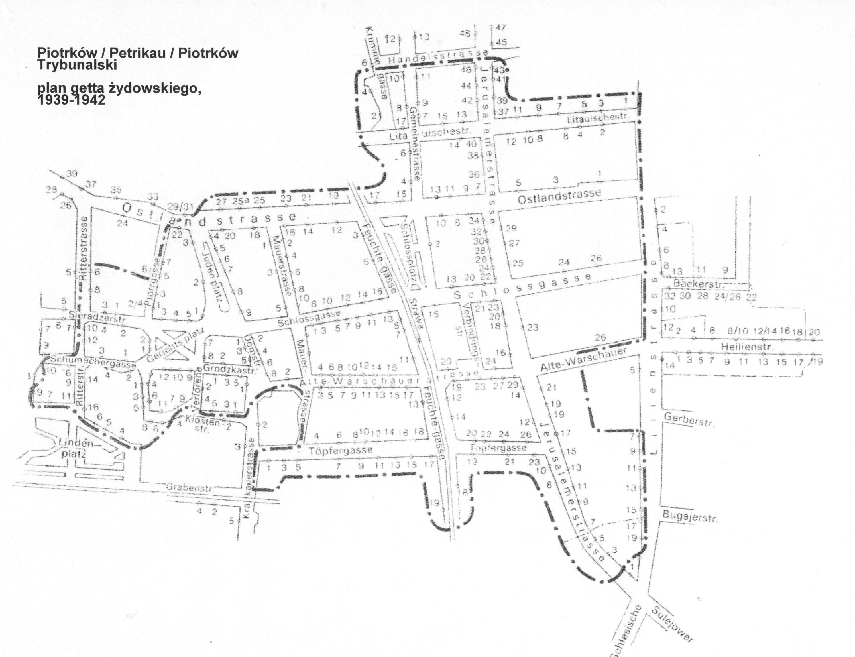 Piotrków / Petrikau / Piotrków Tryb. - szczegółowy plan getta żydowskiego, 5 października 1939 - 29 października 1942 roku.